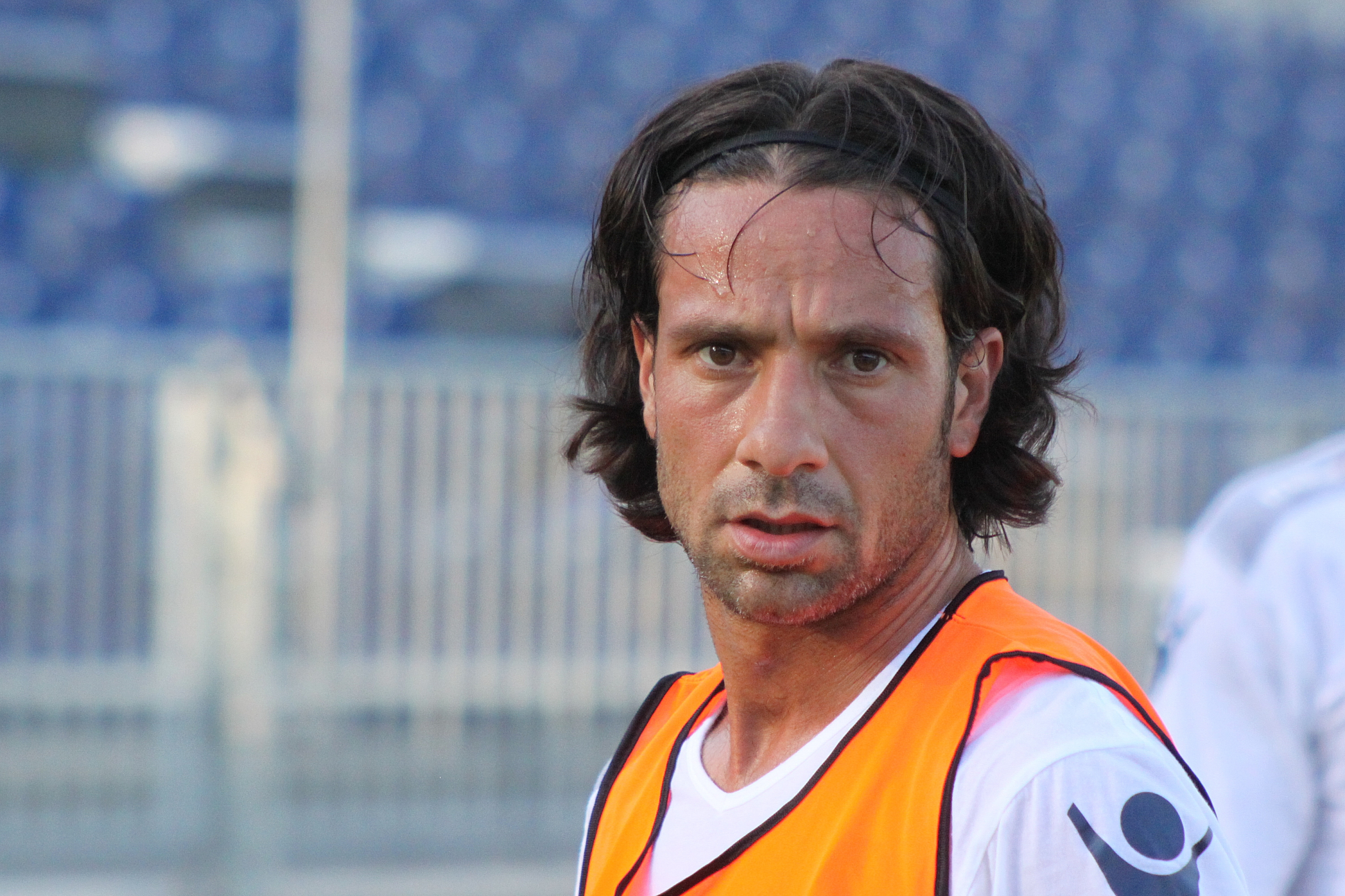 Gianluca Grava - SSC Neapel (3) Gianluca Grava - Società Sportiva Calcio Napoli